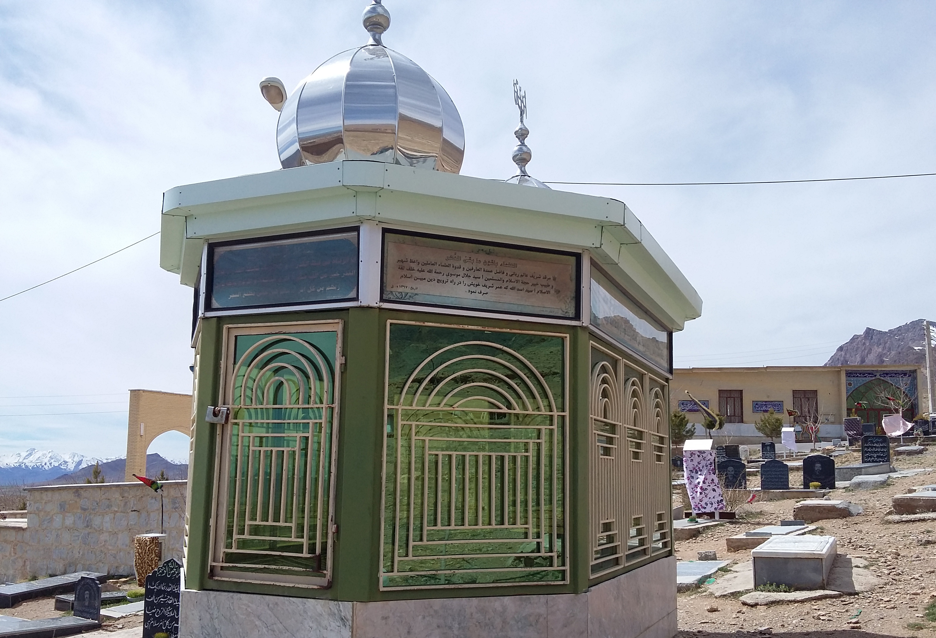 مزار سید جلال موسوی در روستای انالوجه. عکس طی یک سفر تفریحی در تاریخ چهارشنبه ۱۳ اسفند ۱۳۹۳ توسط سید جلیل موسوی گرفته شده است.